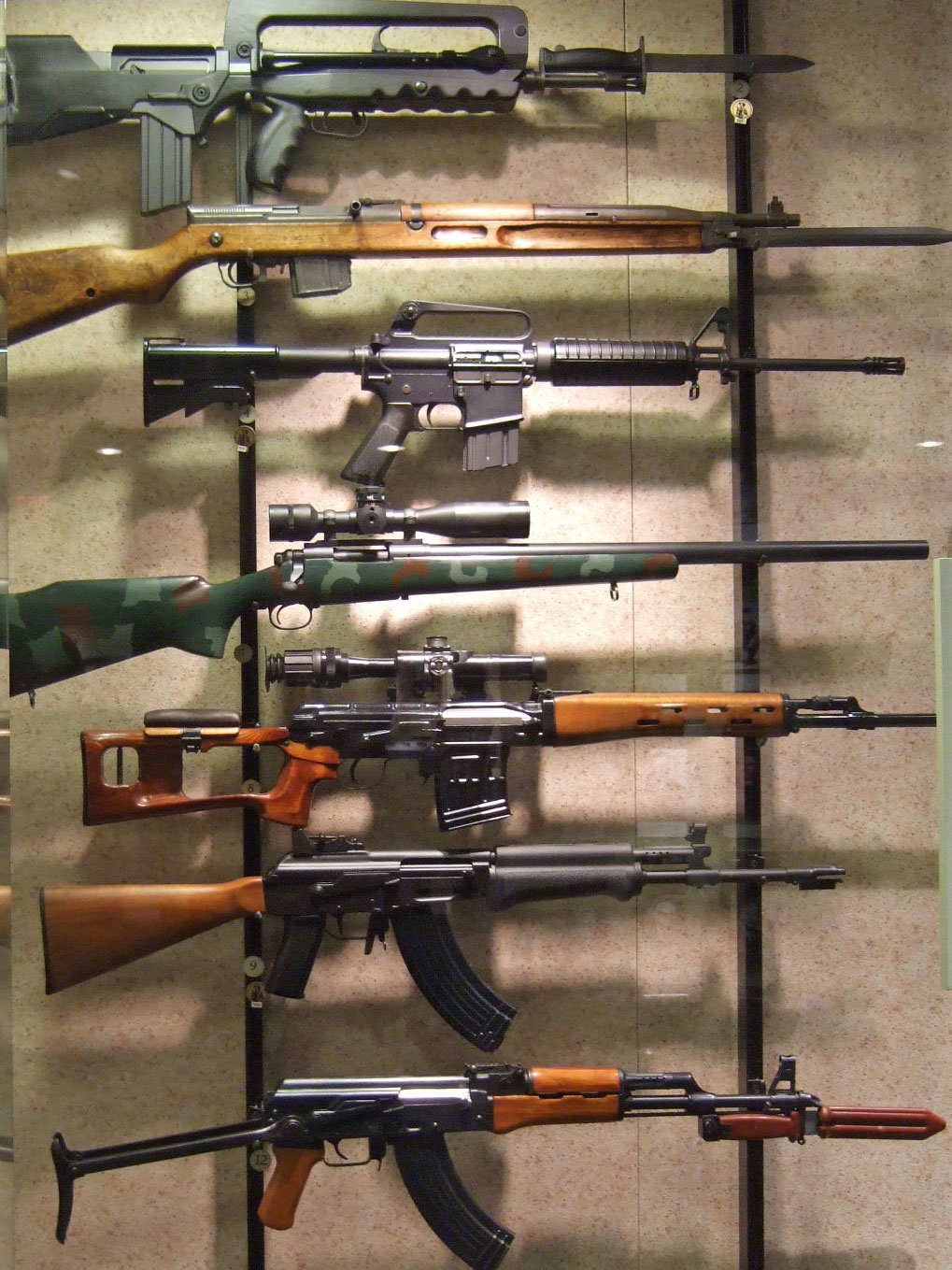 FAMAS, vz.52 , M4, M24 ,SVD, Valmet M76, AKMS rifles